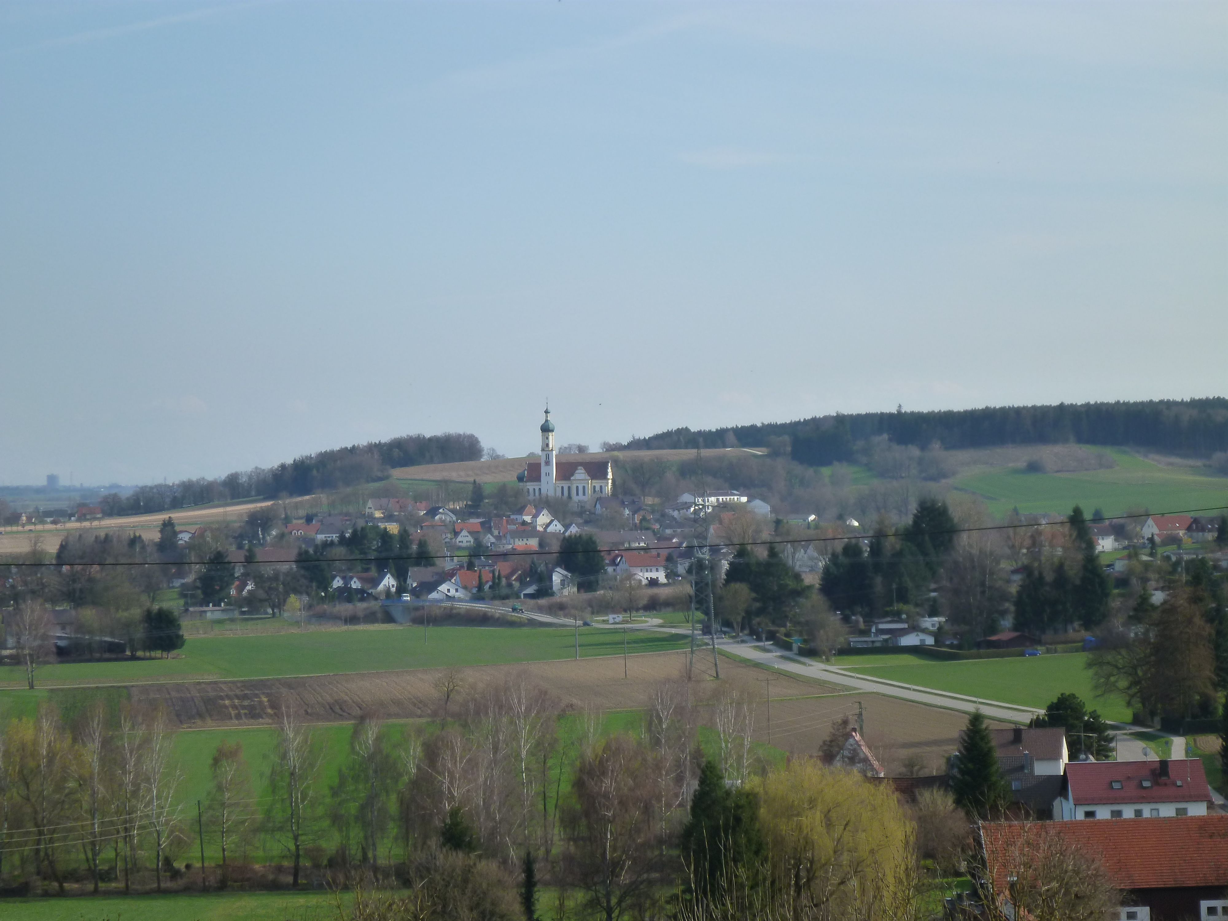 Aufnahme von Burg Markt aus